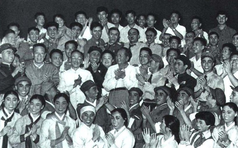 1964-10 1964年 毛泽东与奇袭白虎团剧组合影